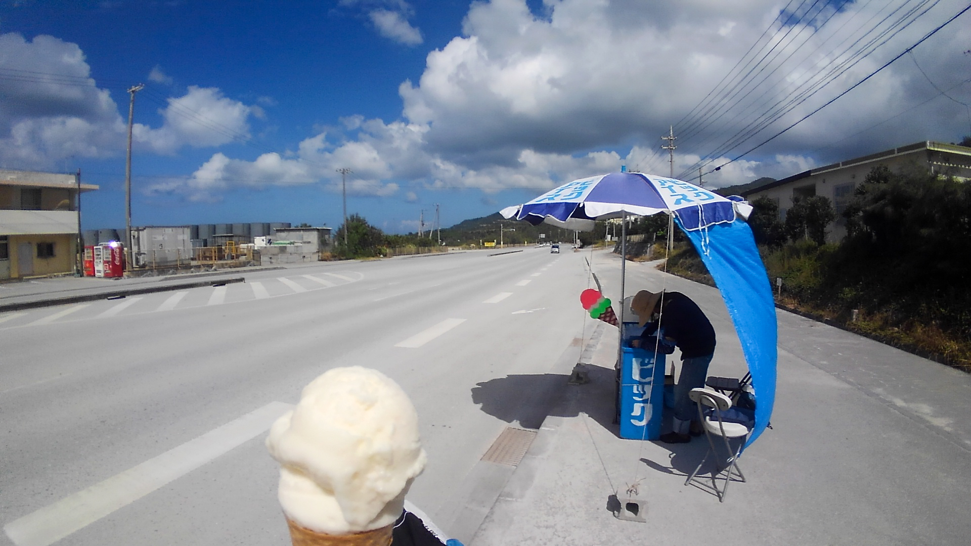 KIMG1243